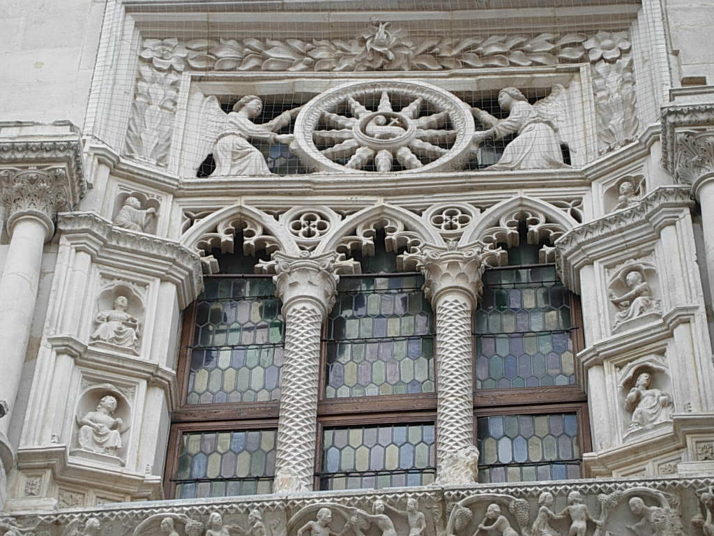 Particolare facciata - Complesso SS. Annunziata di Sulmona (AQ) Foto personale